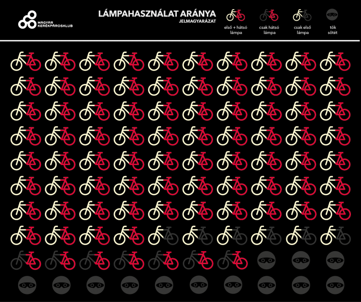 Magyar Kerékpárosklub, lámpaszámlálás, 2015 ősz. Az infografika az első/hátsó lámpával illetve anélkül közlekedők arányát mutatja. A felmérést a Kerékpárosklub végezte egy lámpahasználattal kapcsolatos kampány részeként.